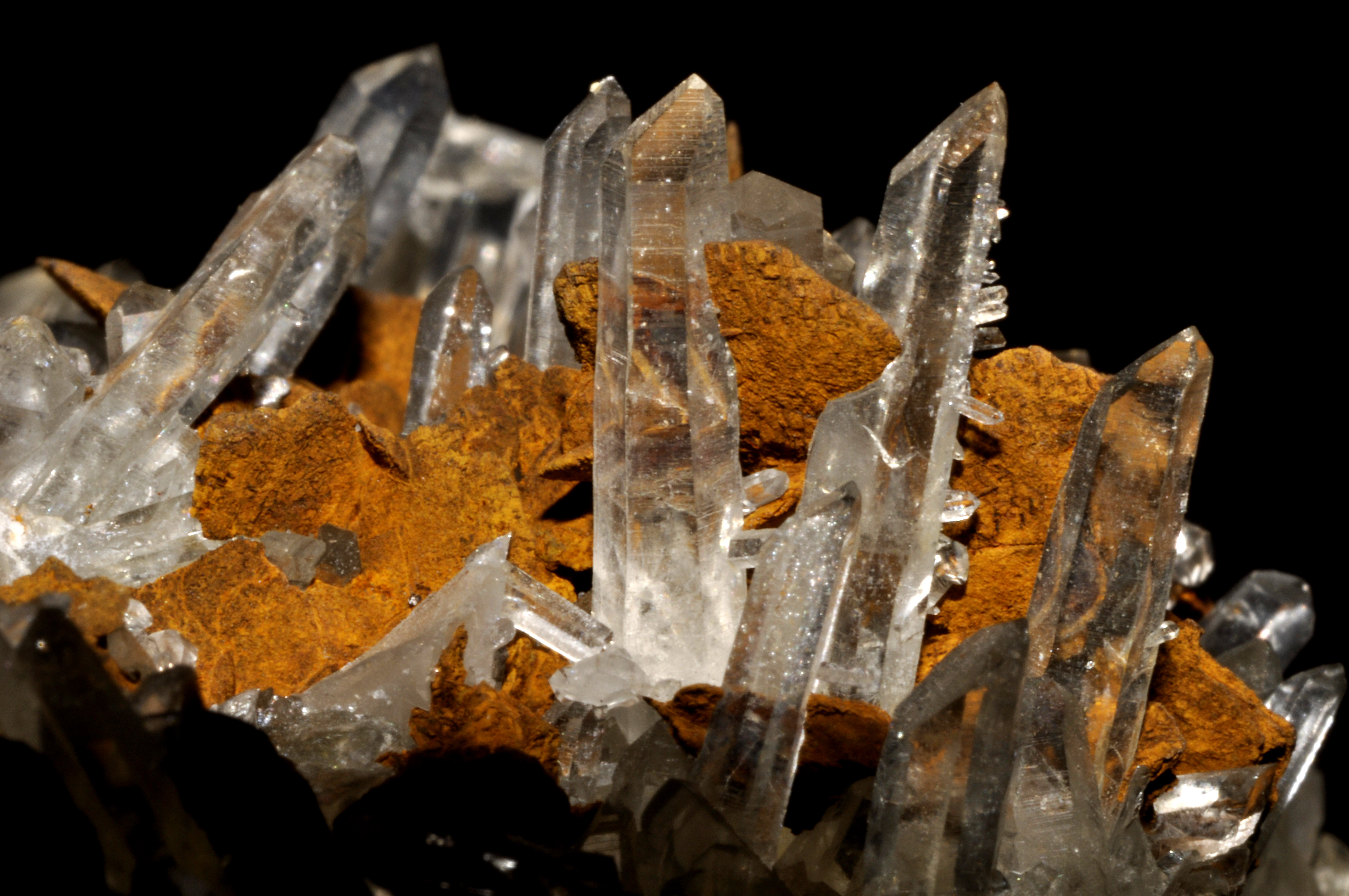 cristaux de sidérite et cristaux de quartz